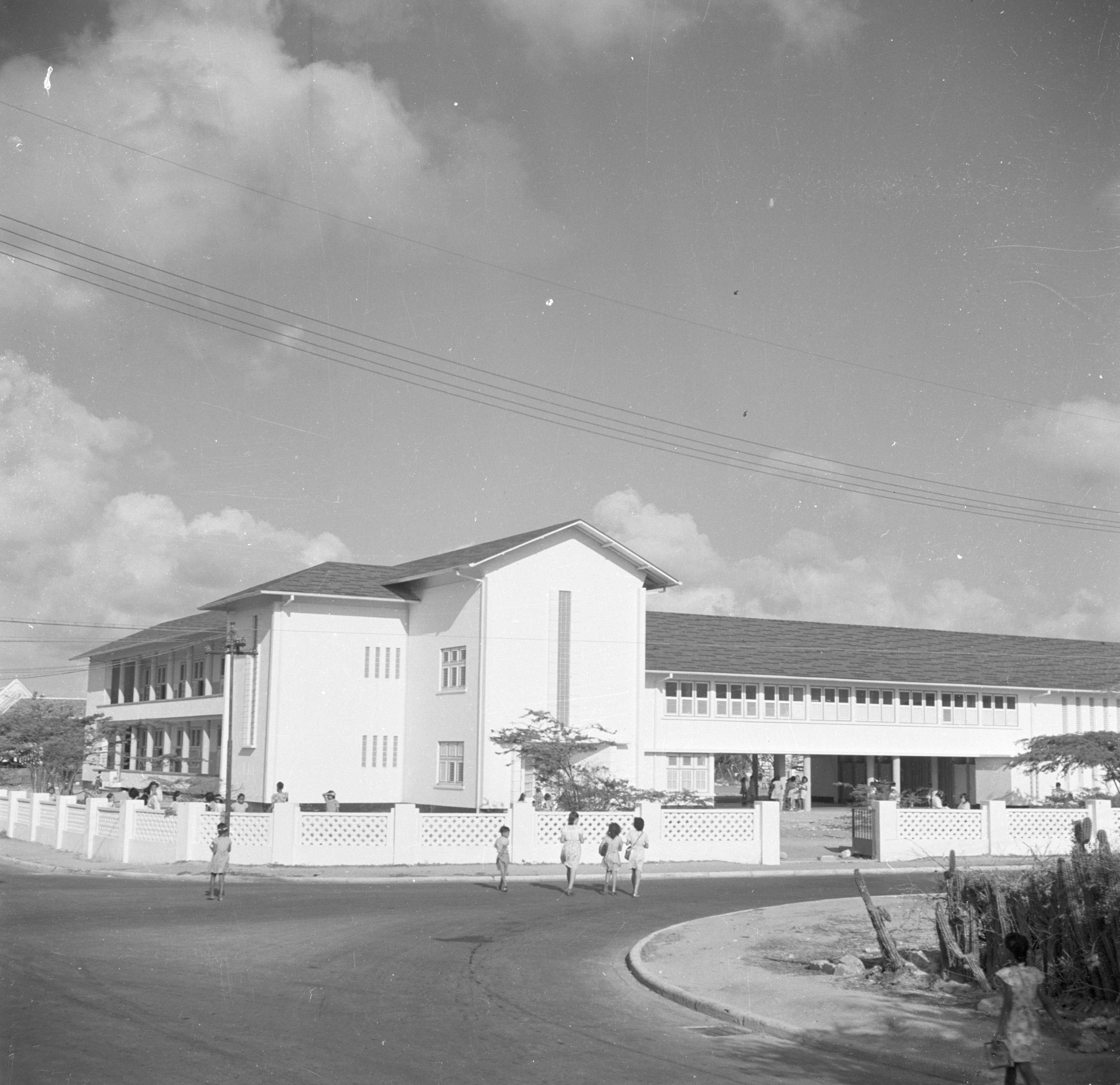 Collectie / Archief : Fotocollectie Van de Poll Reportage / Serie : Reis naar Suriname en de Nederlandse Antillen Beschrijving : De MULOschool Mariacollege in Oranjestad op Aruba Datum : 1947 Locatie : Aruba, Oranjestad Trefwoorden : scholen Persoonsnaam : kloosterweg, maria college Fotograaf : Poll, Willem van de, [onbekend] Auteursrechthebbende : Nationaal Archief Materiaalsoort : Negatief (zwart/wit) Nummer archiefinventaris : bekijk toegang 2.24.14.02 Bestanddeelnummer : 252-7881